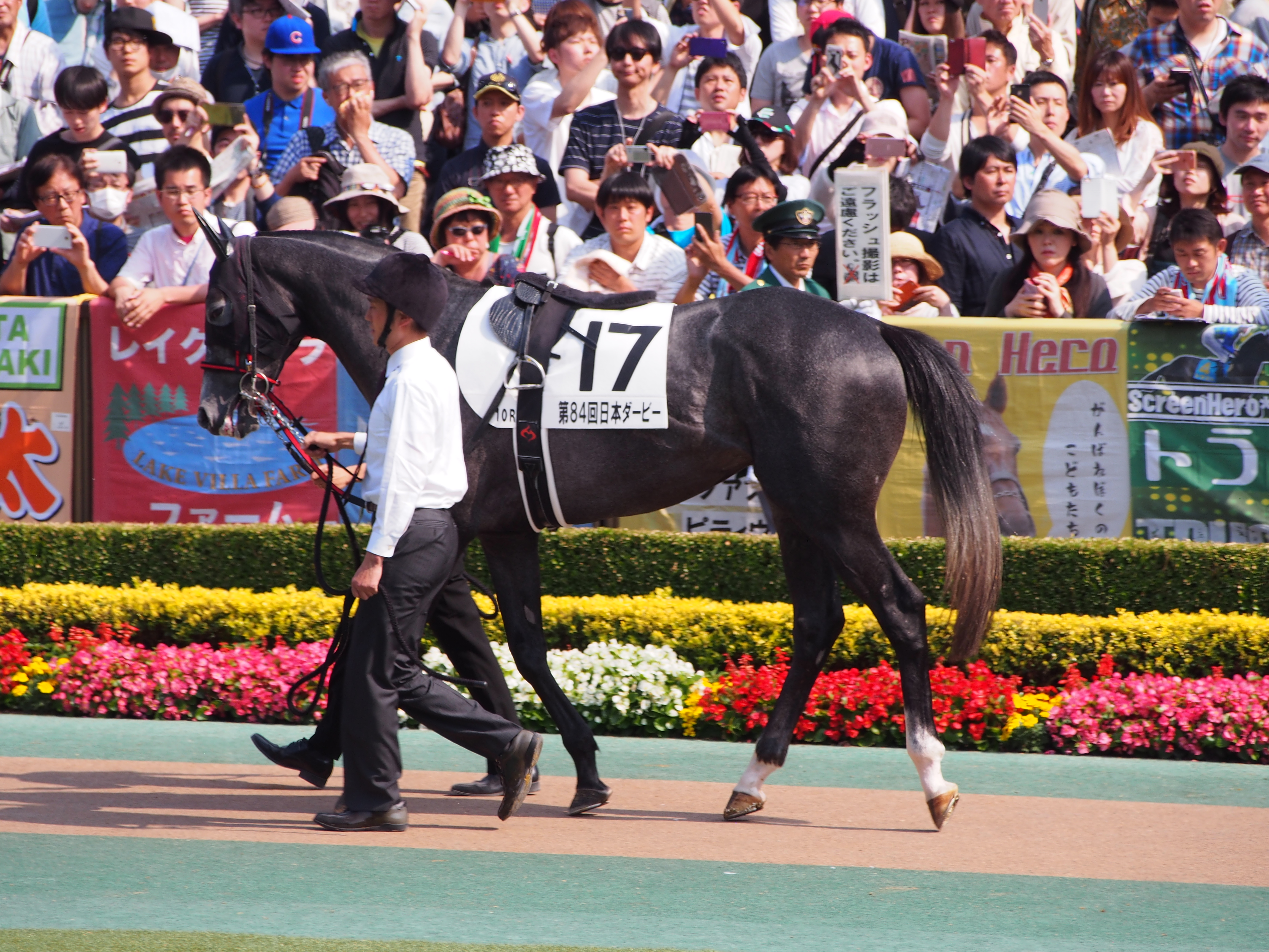 10R Tokyo Yushun Japanese Derby 東京優駿(日本ダービー)